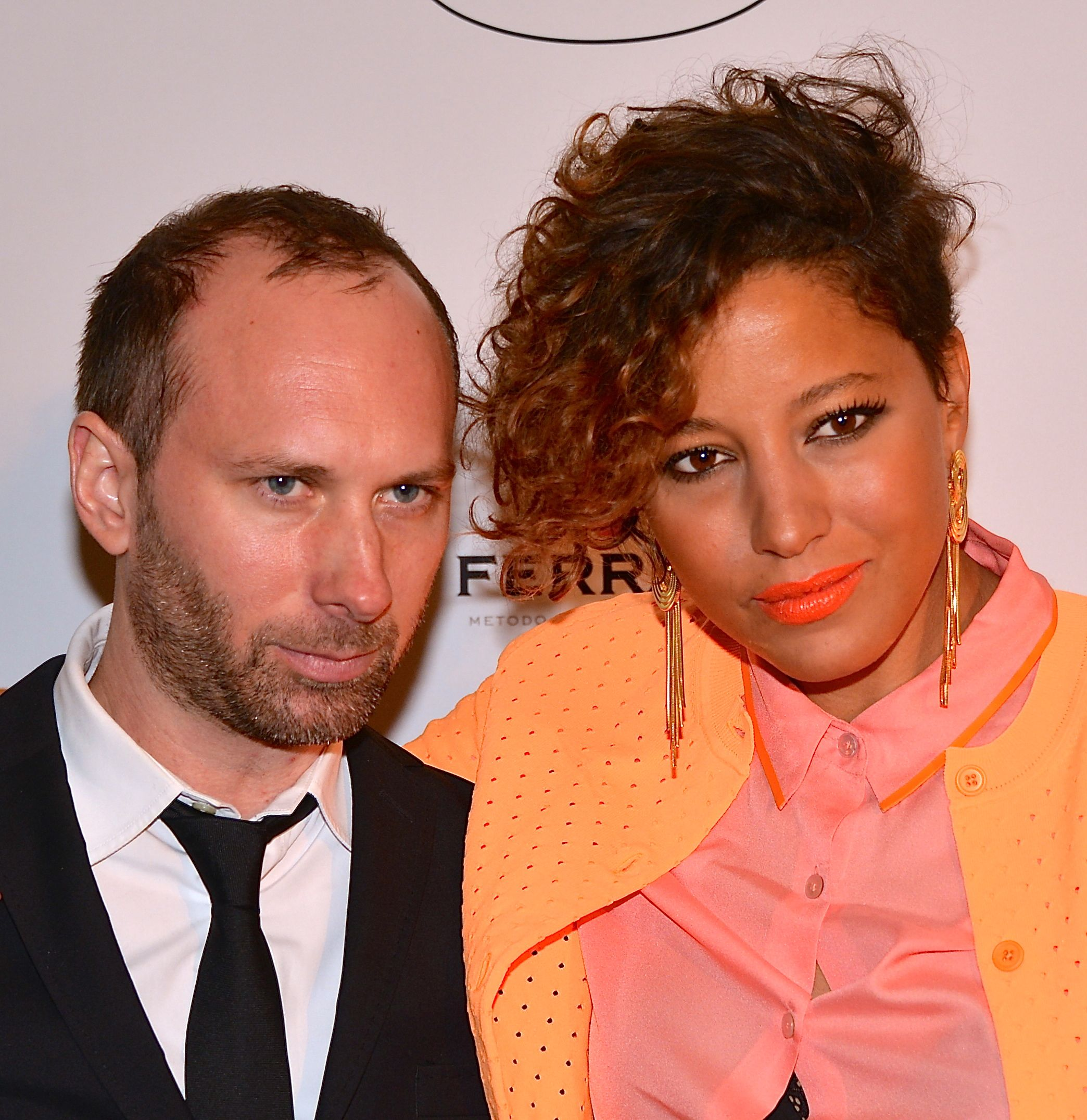 Andreas Unge & Jessica Folcker på på Guldbaggegalan 2013 den 21 januari 2013.